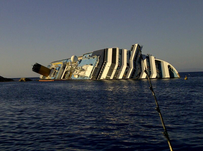 Costa Concordia, il naufragio.